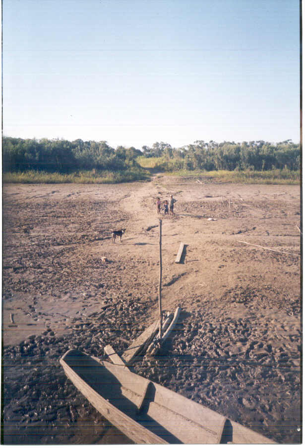 Imagen tomada a la orilla del río Mamoré (Beni, Bolivia) en 2004.